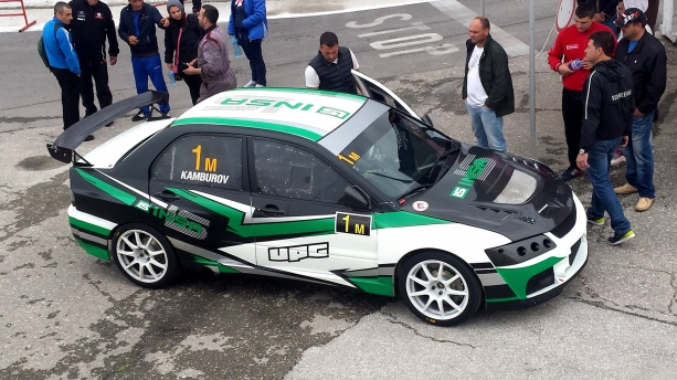 Шампионският автомобил на Пламен Камбуров от Сезон 2016 г.